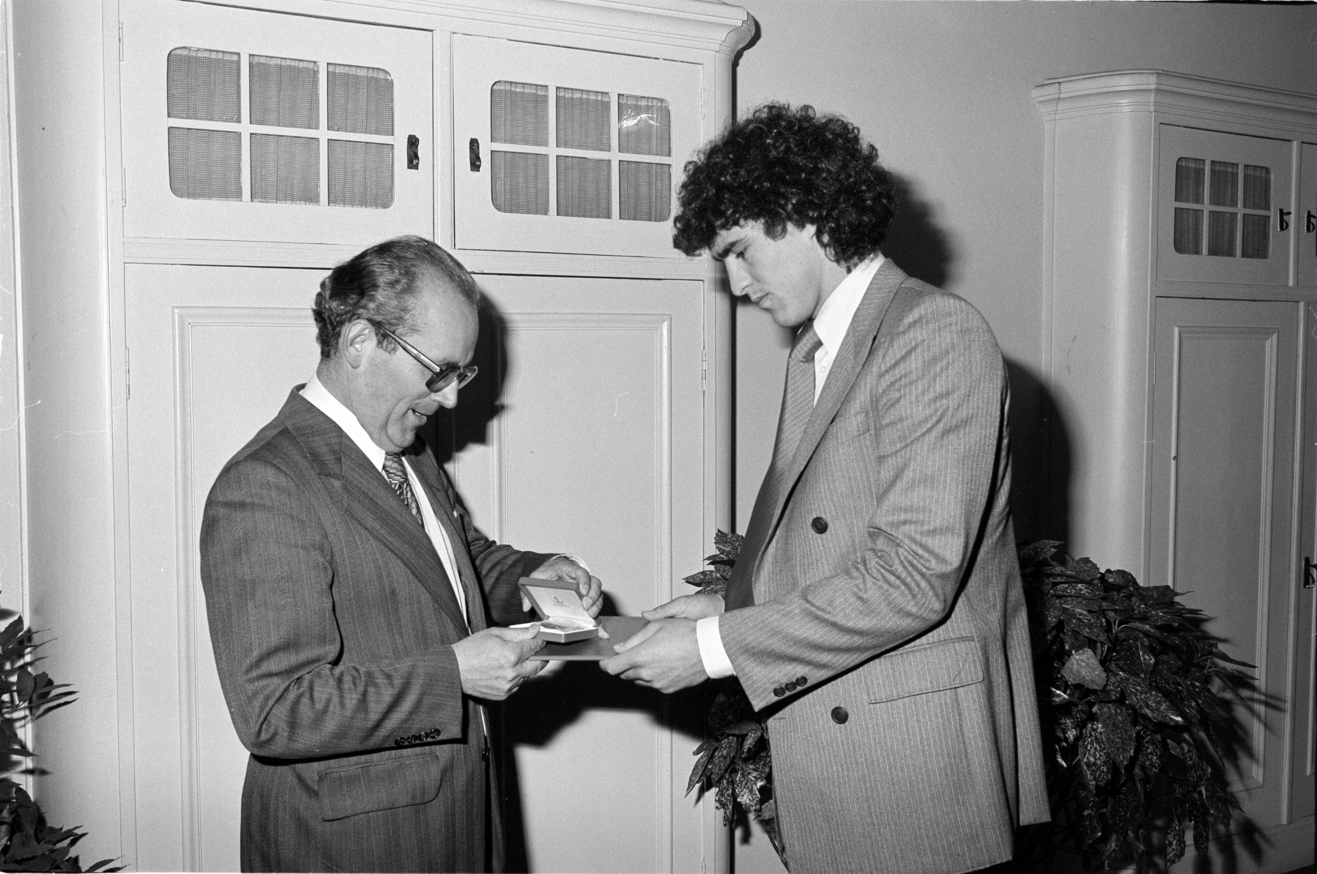 Herbert Kessler überreicht Bruno Pezzy das Sportehrenzeichen des Landes Vorarlberg